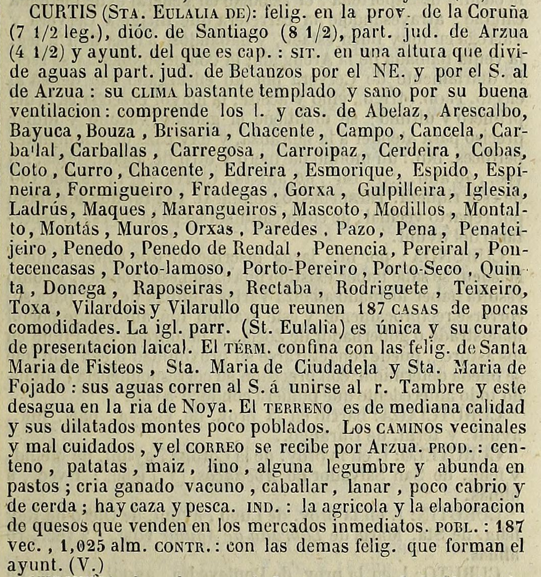 Curtis no Diccionario geográfico-estadístico-histórico de España y sus posesiones de Ultramar.